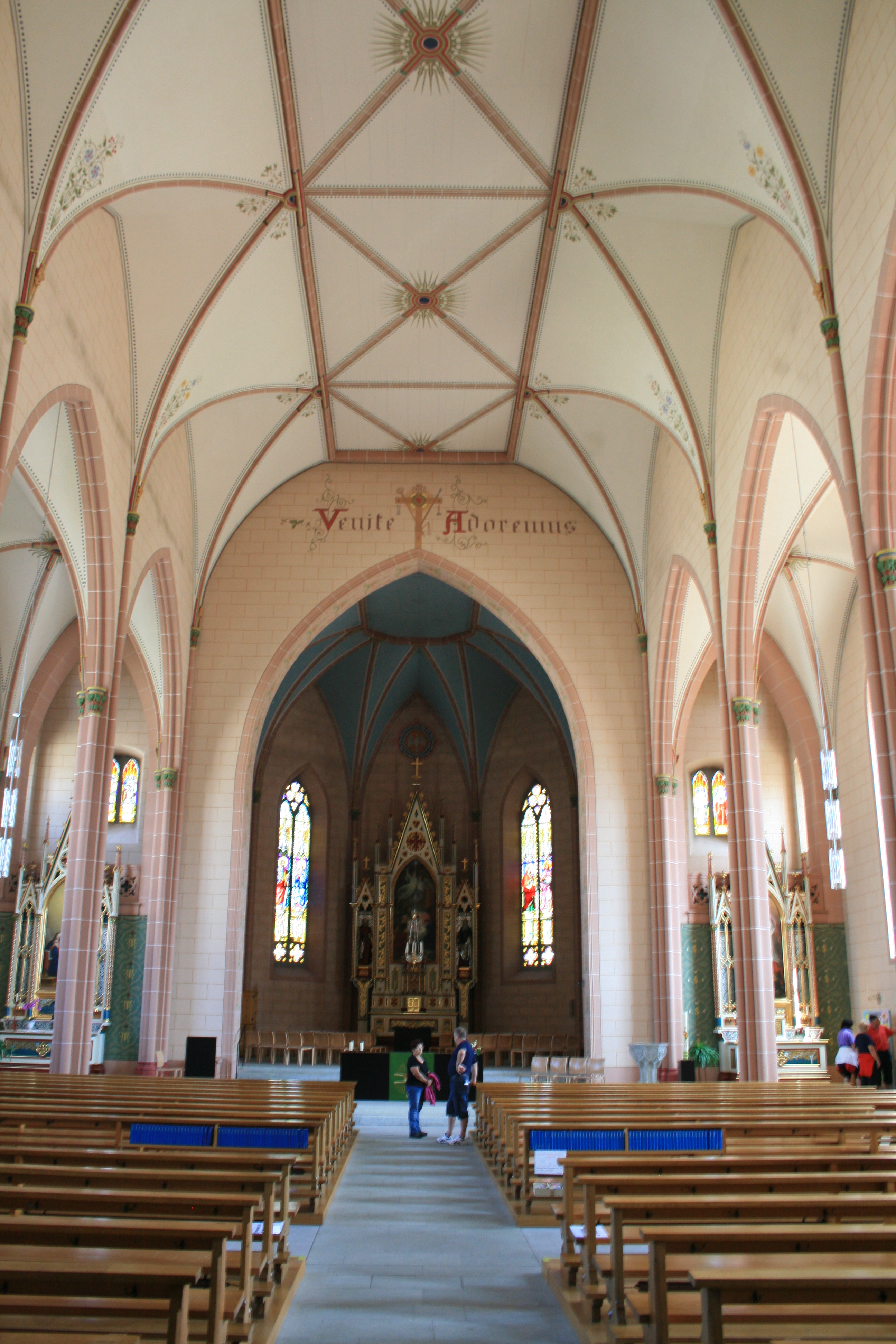 Katholische Kirche Leuggern